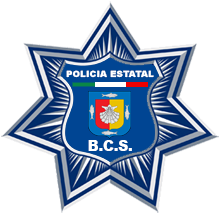 Escudo de la Policía Estatal Preventiva de Baja California Sur